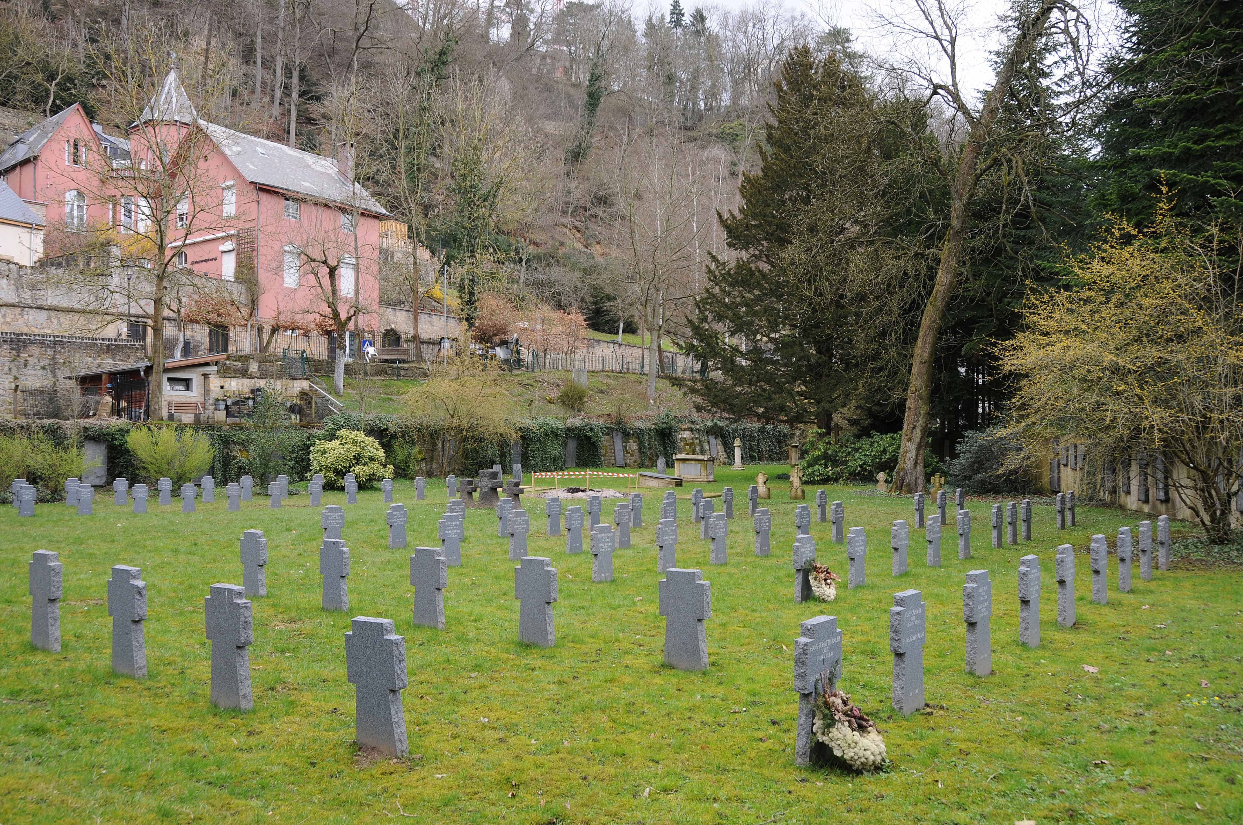 Begravelsessted i byen Clausen i Luxemborg.